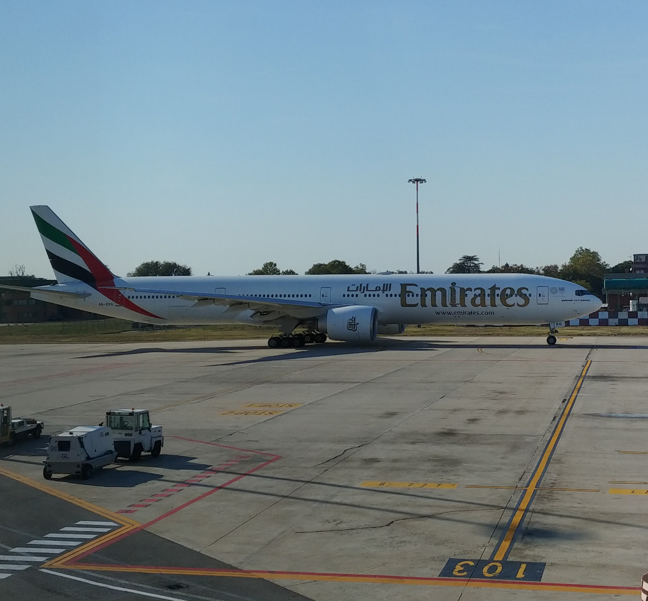 Aeromobile in fase di preparazione al decollo